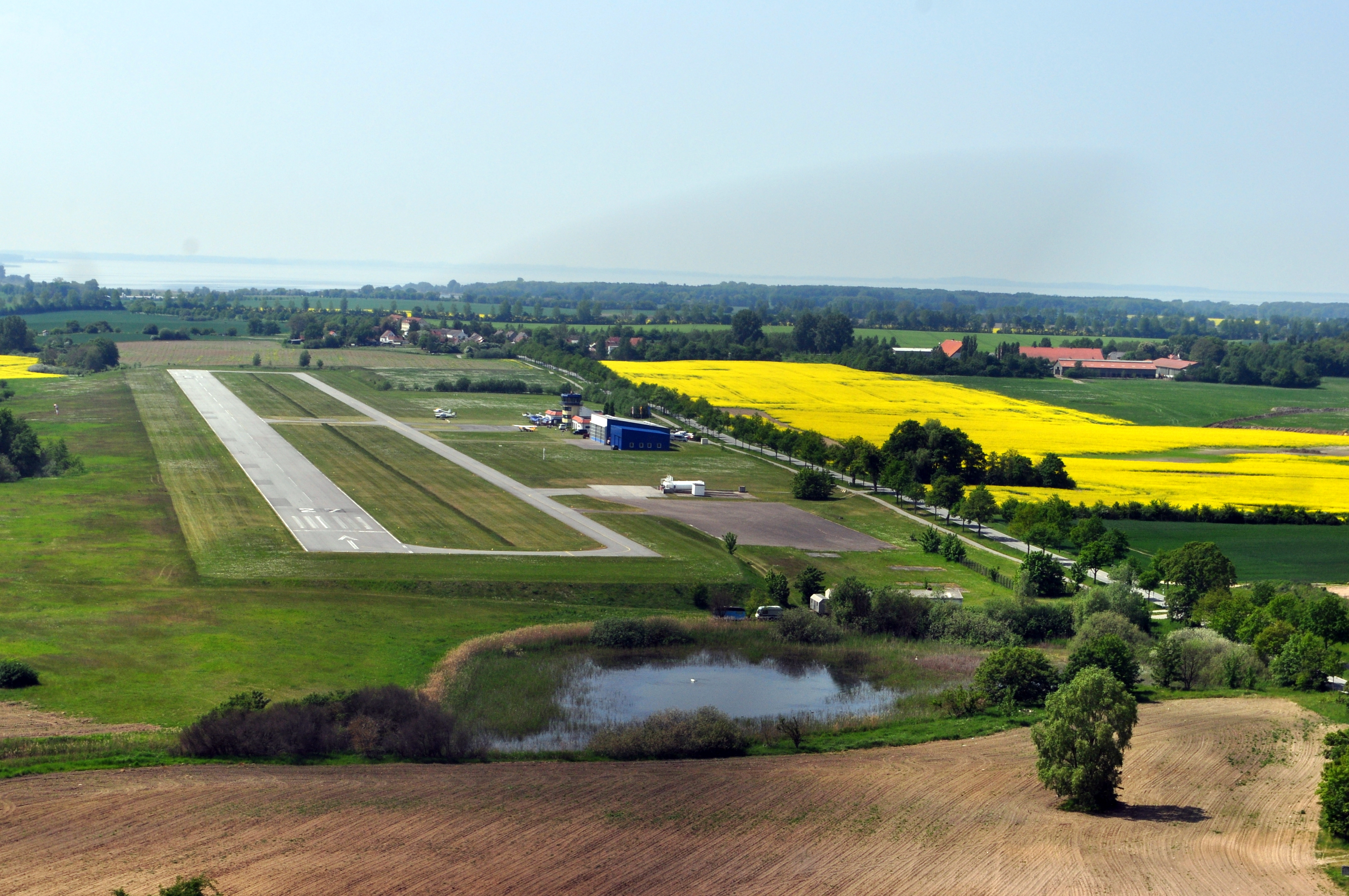 Die Bilder wurden von mir während eines einstündigen Rundflugs ab Flugplatz Güttin am 21. Mai 2011 aufgenommen. Die Bildbeschreibung steht im Dateinamen. Aufgenommen mit einer Nikon D5000 durch das Seitenfenster des Flugzeugs.